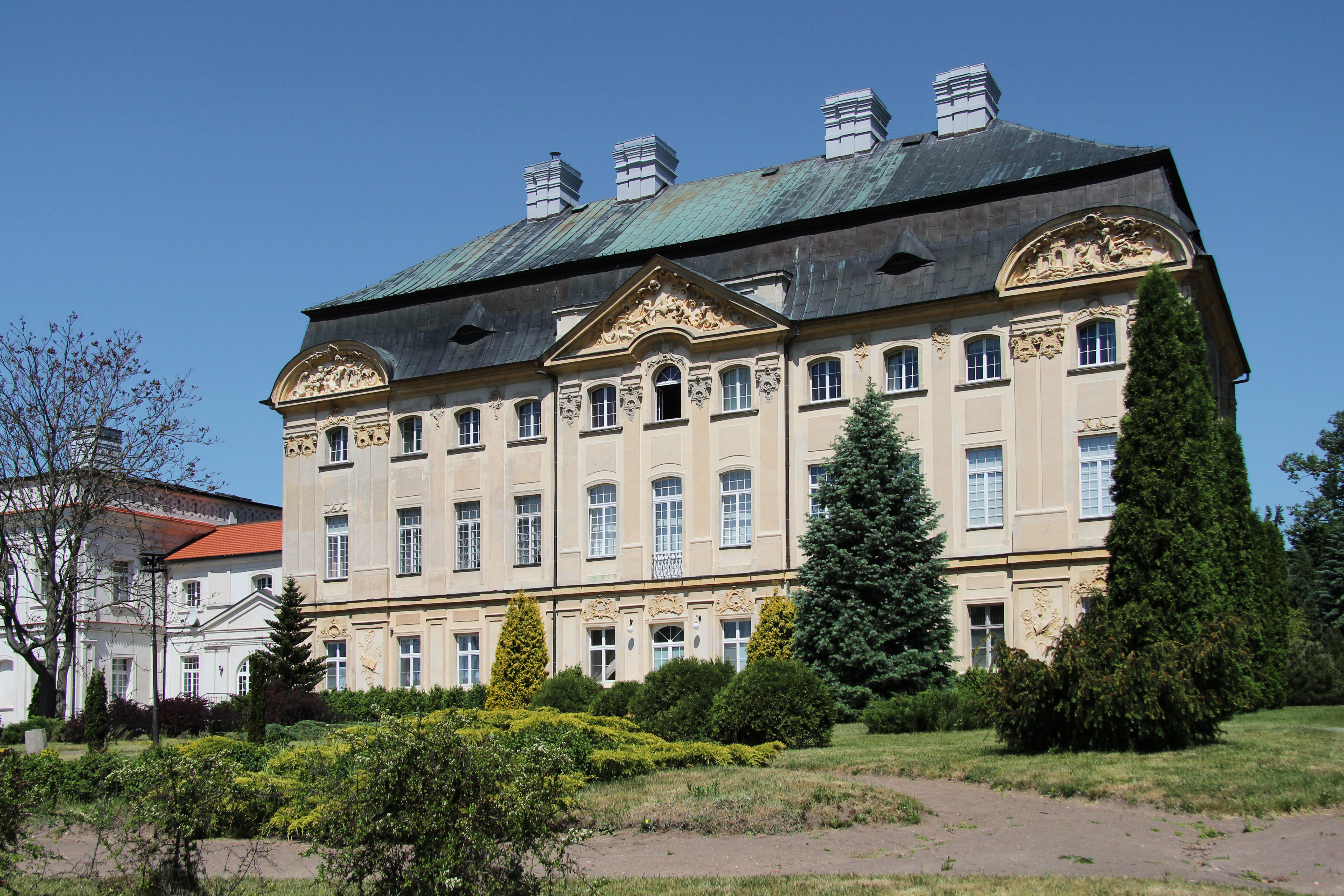 Ciążeń - Pałac biskupi (2 poł. XVIII w.), elewacja ogrodowa